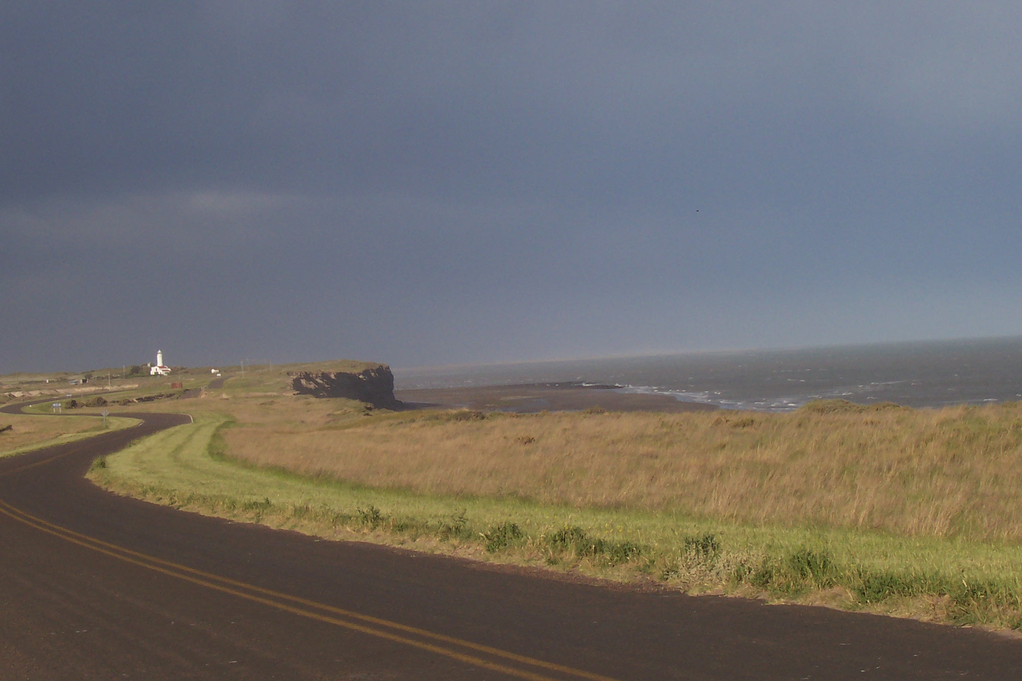 Panórámica de una parte del Balneario "El Condor" (Río Negro, Argentina) tomada a la altura de la Segunda Bajada del Faro